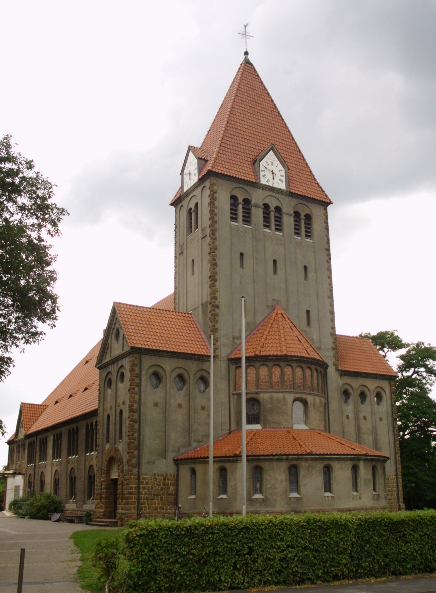 evangelische Christuskirche in Obernbeck, einem Stadtteil von Löhne, Nordrhein-Westfalen, Deutschland; erbaut 1913-1914 nach Entwurf des Architekten Joseph Campani